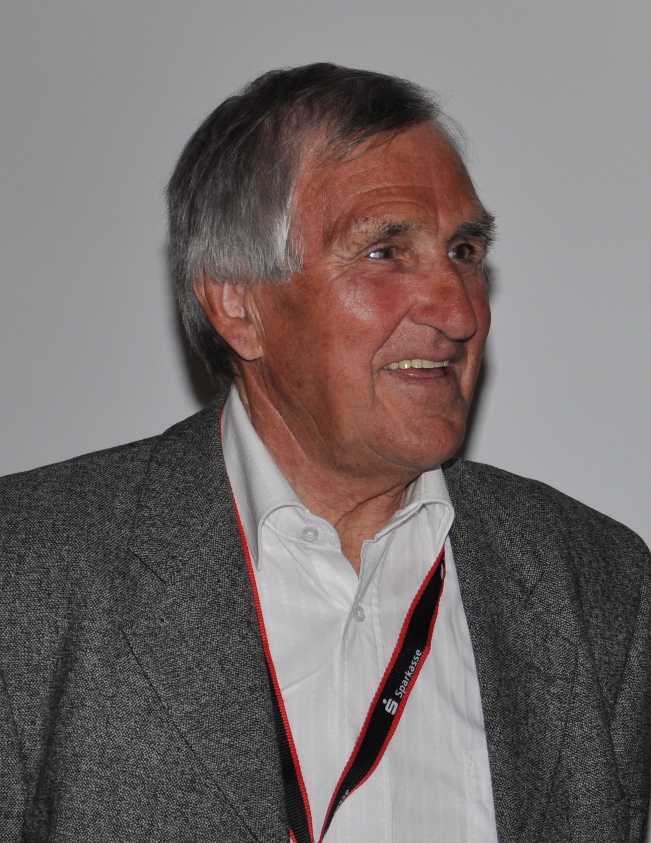 Hans (genannt Hennes) Junkermann (links) und Rudi Altig im Interview mit Marcel Wüst beim Empfang der 'Tour de Neuss' am 28.07.2010